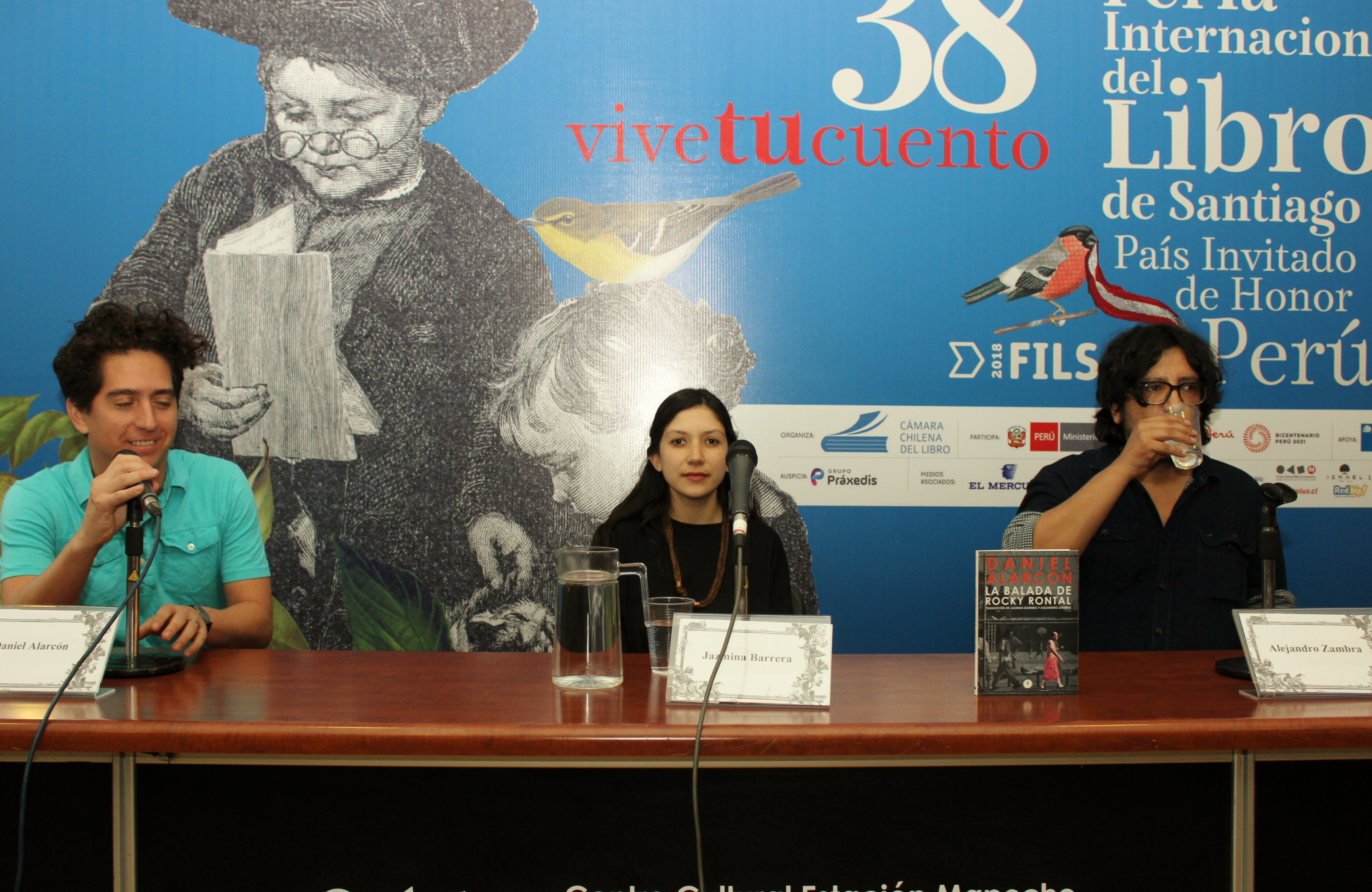 El escritor peruano-estaodunidense Daniel Alarcón, la mexicana Jazmina Barrera y el chileno Alejandro Zambra en el conversatorio en torno al libro de Daniel Alarcón La balada de Rocky Rontal, traducido al español por esta pareja. El encuentro transcurrió en el marco de la Feria Internacional del Libro de Santiago 2018 (sala Acario Cotapos, 2 de noviembre).